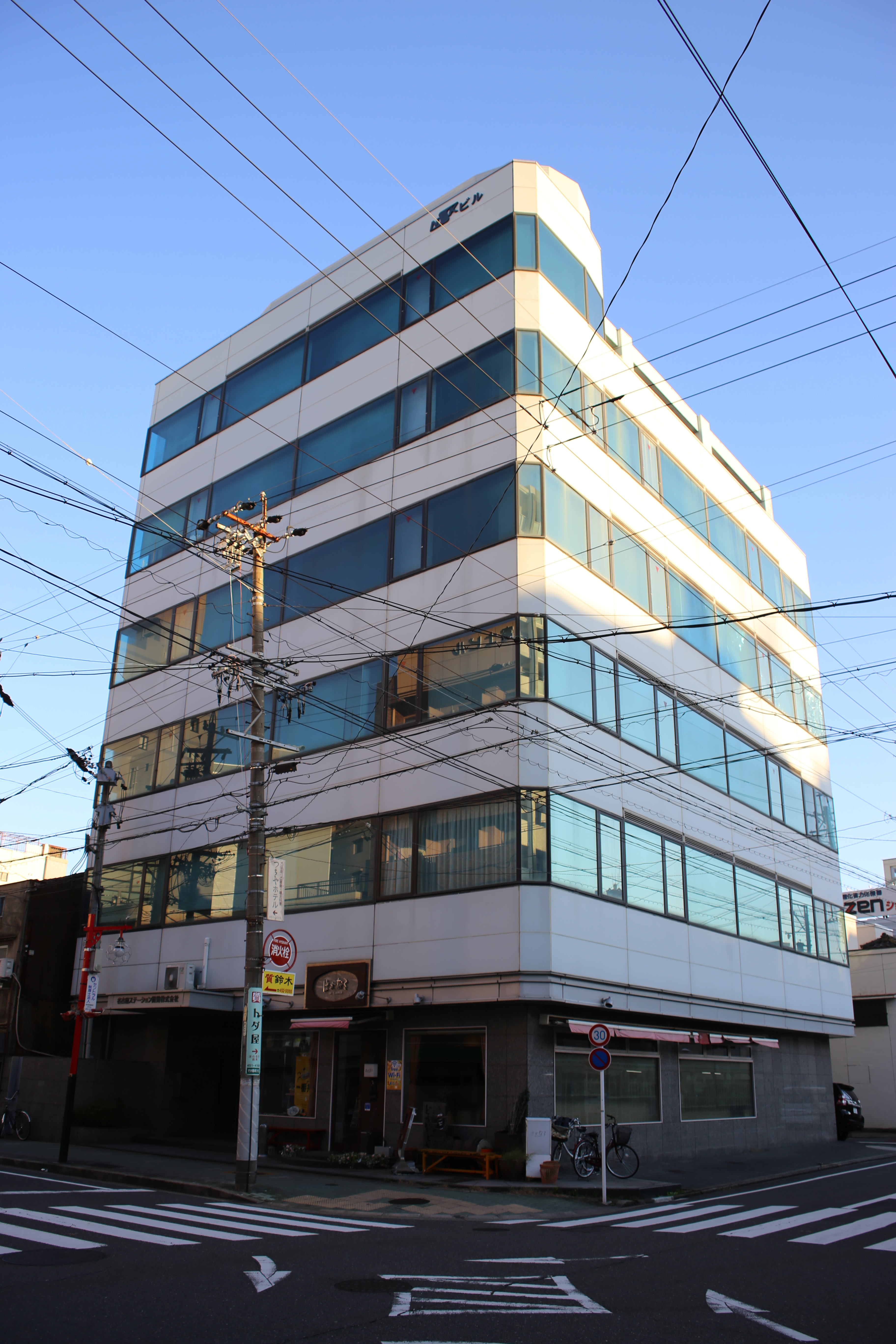 名古屋市中村区竹橋町の名古屋ステーション開発本社ビルを西側公道北側より撮影